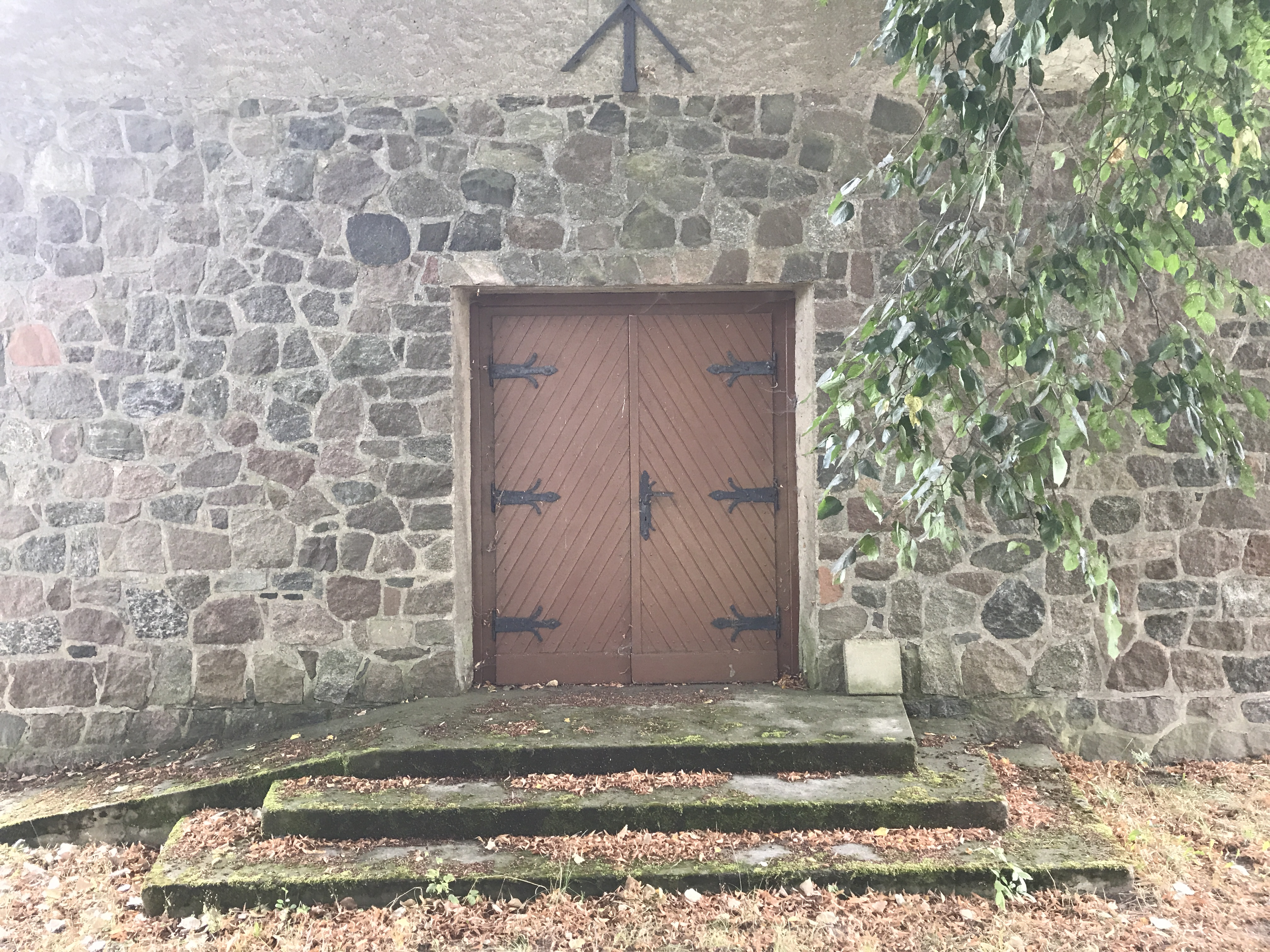 Die Kapelle Gremersdorf entstand im Jahr 1954 aus behauenen Feldsteinen. Die Kirchenausstattung ist schlicht.